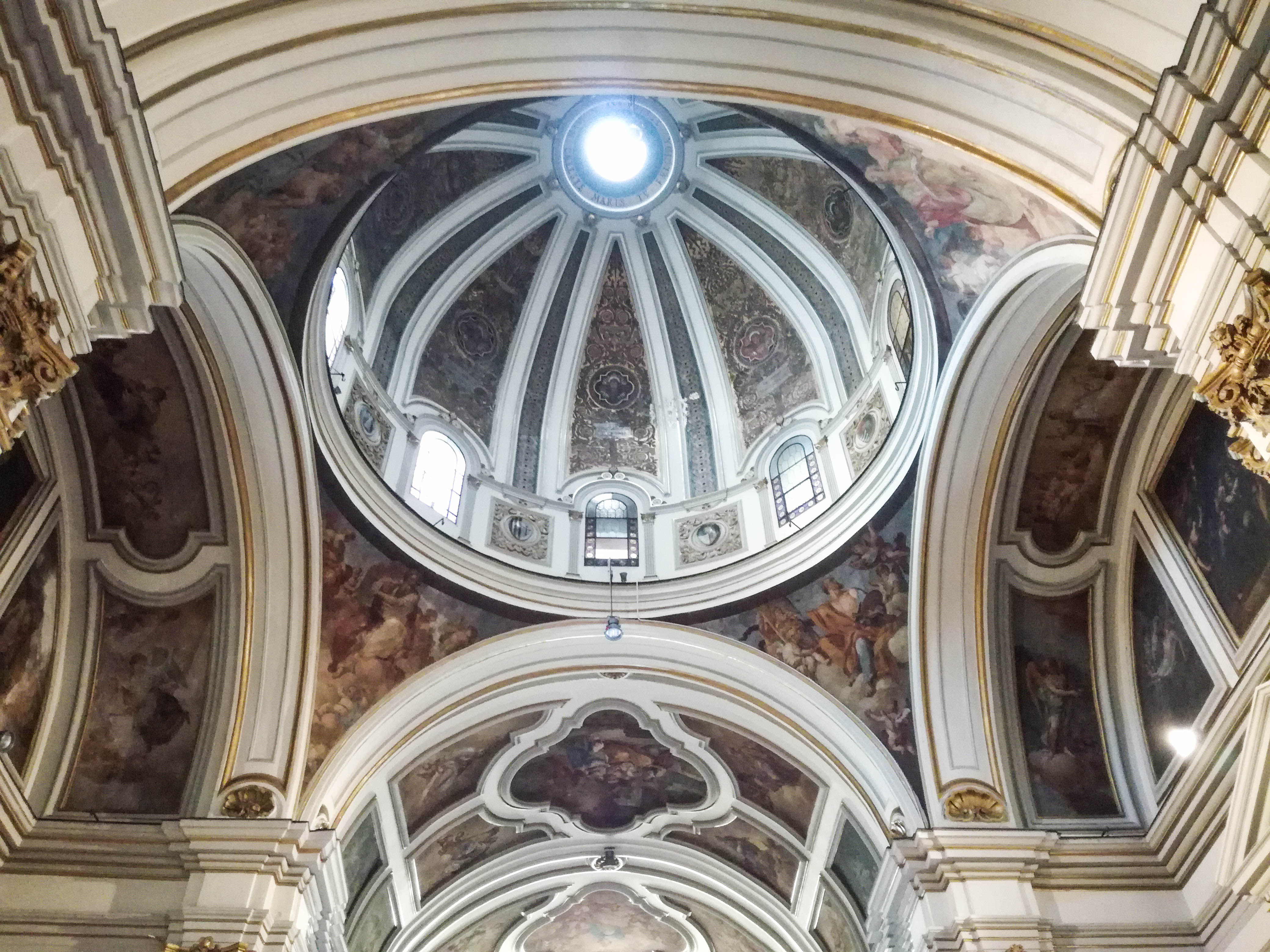 Cupola S. Maria di Piedigrotta, Napoli